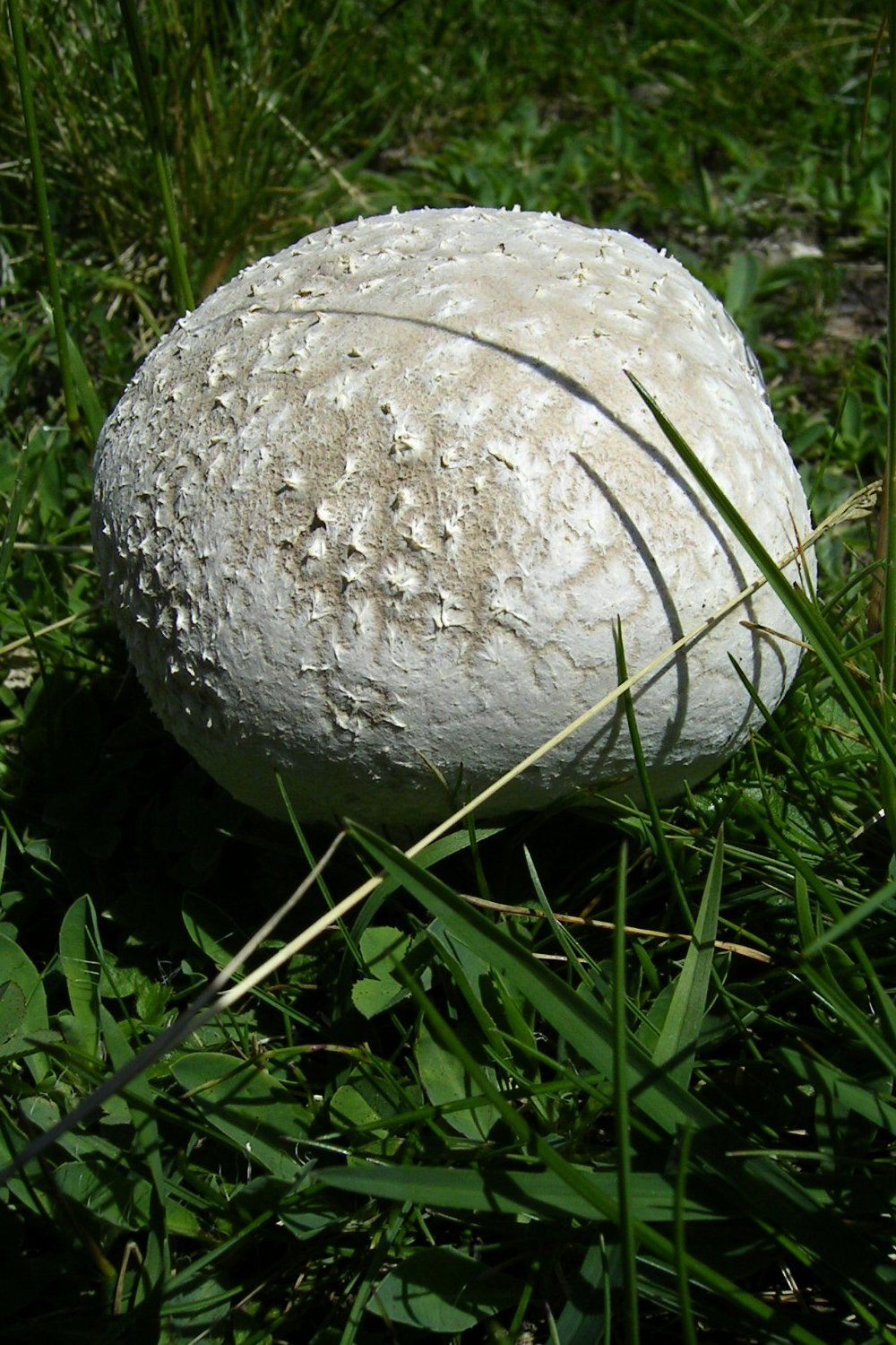 (de) Riesenbovist (Langermannia gigantea) auf dem Susten (CH) (en) Giant puffball. Susten, Switzerland. Bearbeitung: Zugeschnitten, Farbwertkorrektur